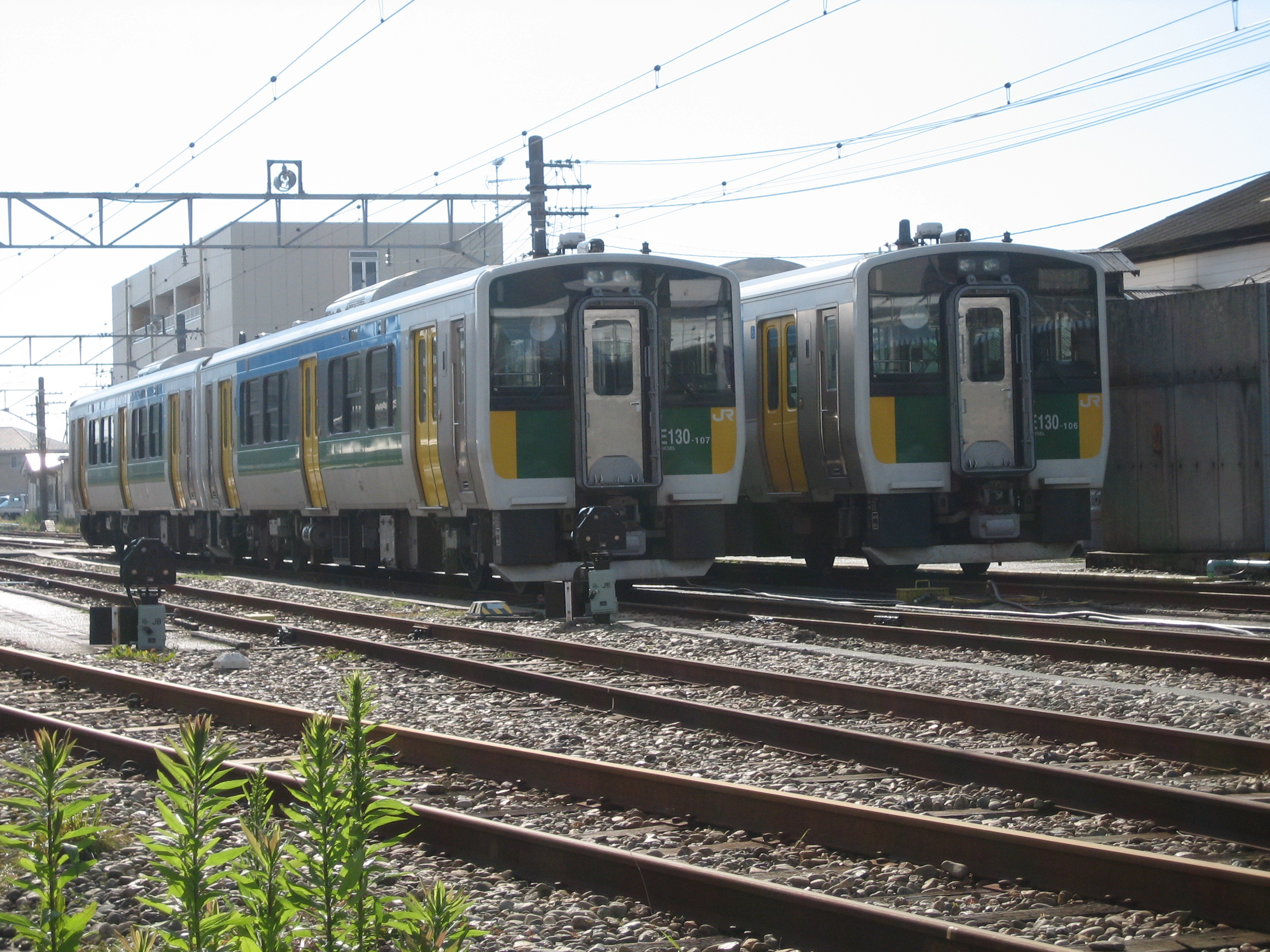 木更津駅の車庫で停泊中のキハE130系